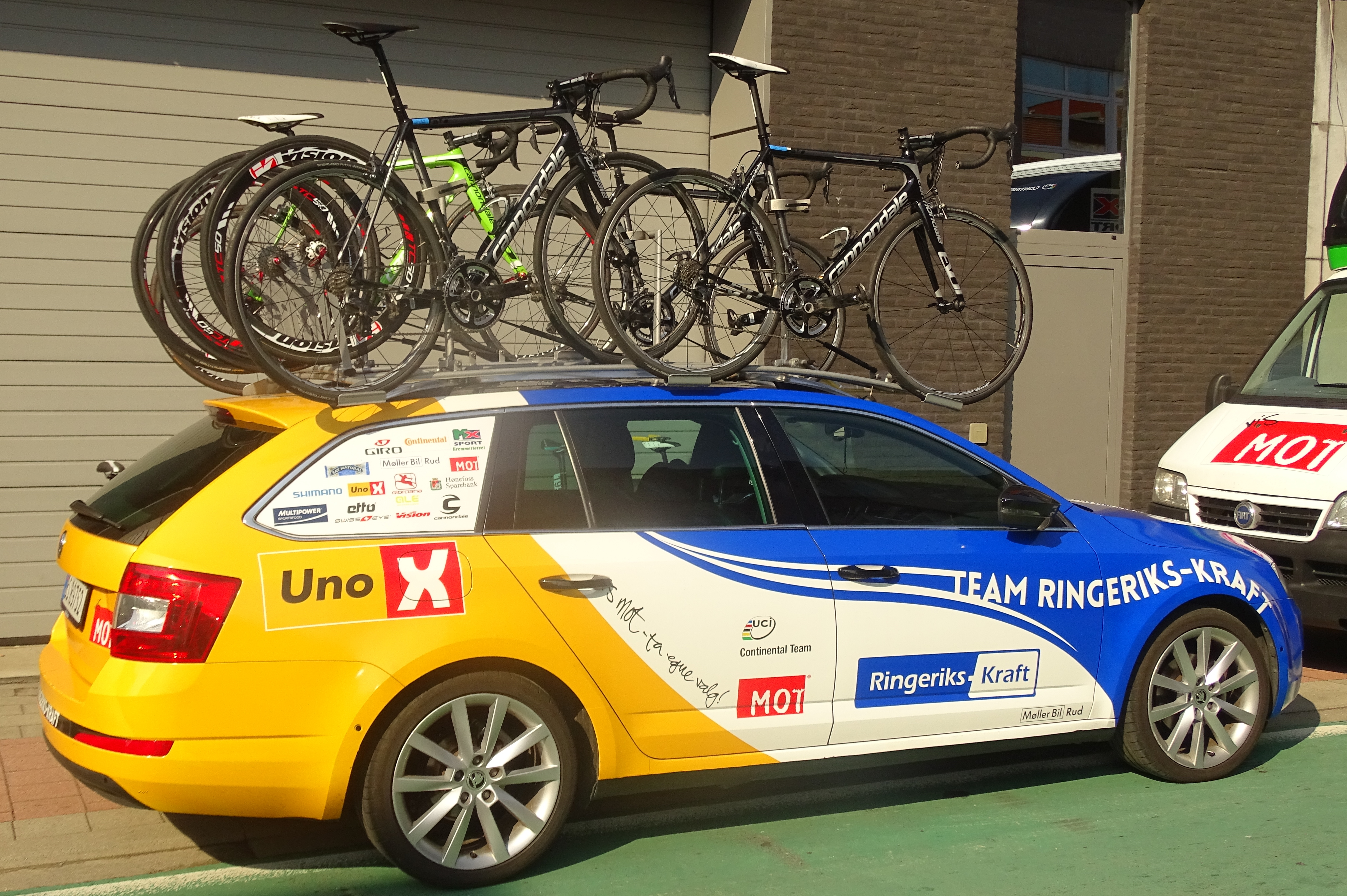 Reportage réalisé le dimanche 30 août à l'occasion du départ et de l'arrivée de la Coupe Sels 2015 à Merksem (Anvers), Belgique.